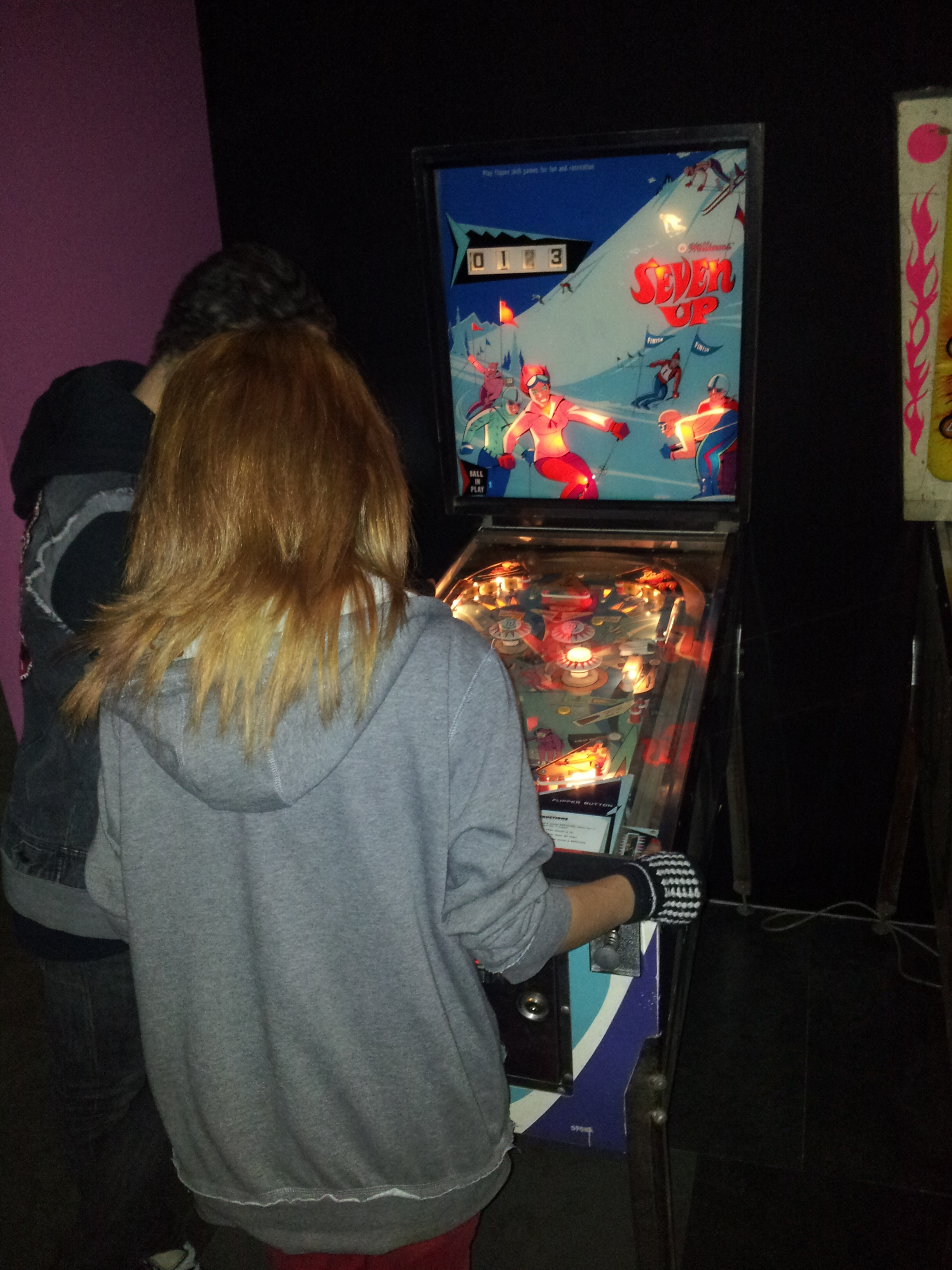 Parella juga al pinball "Seven-up", de Williams electronics (anys 1960).